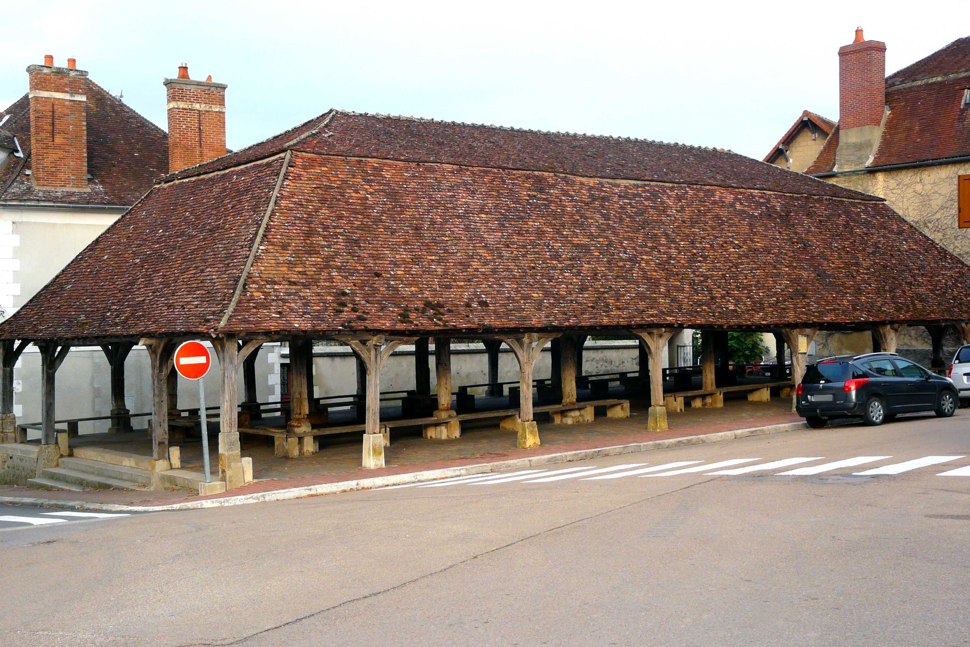 halles de Seignelay, vue du Nord